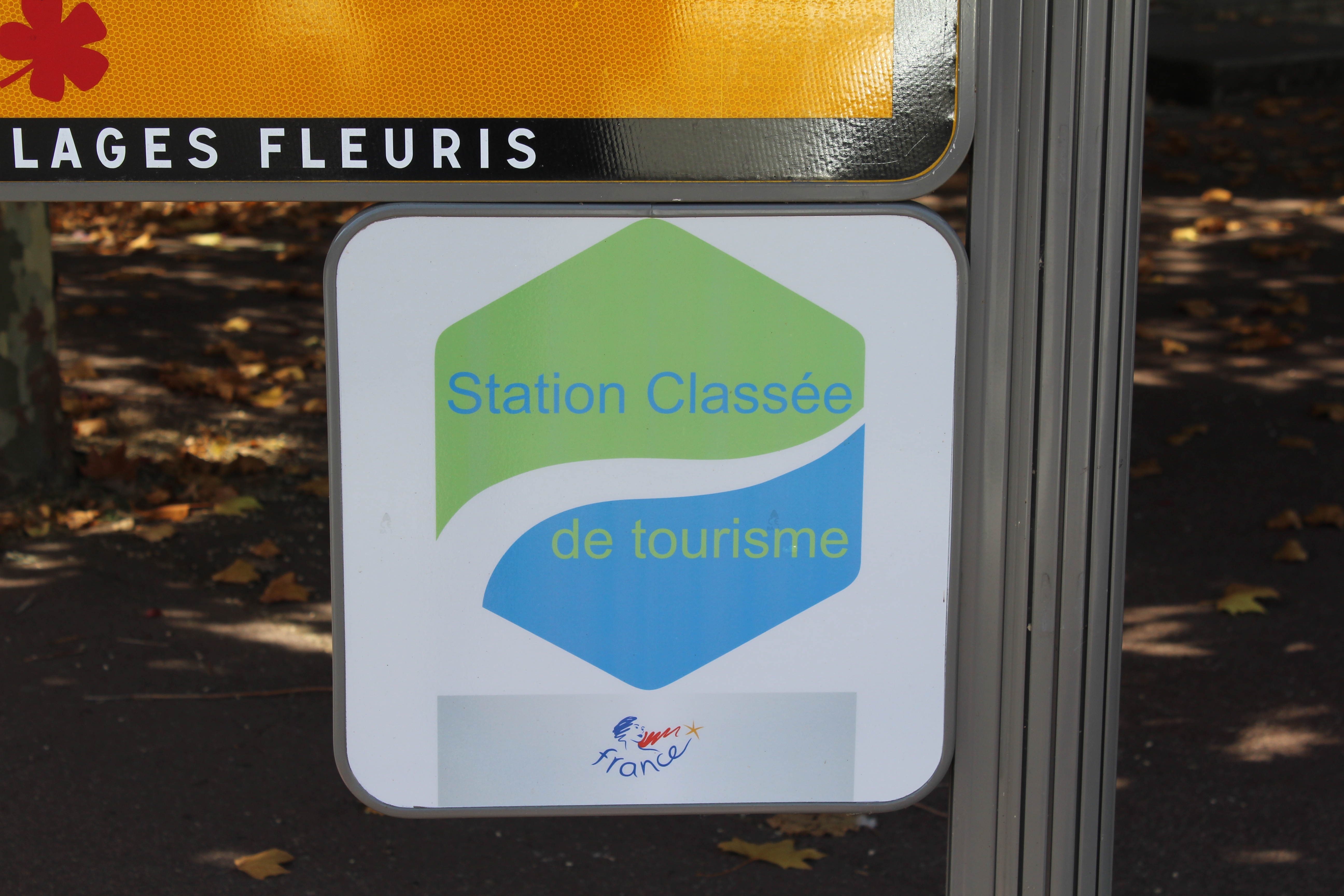 Panneau Station Classée de Tourisme dans Fontainebleau.